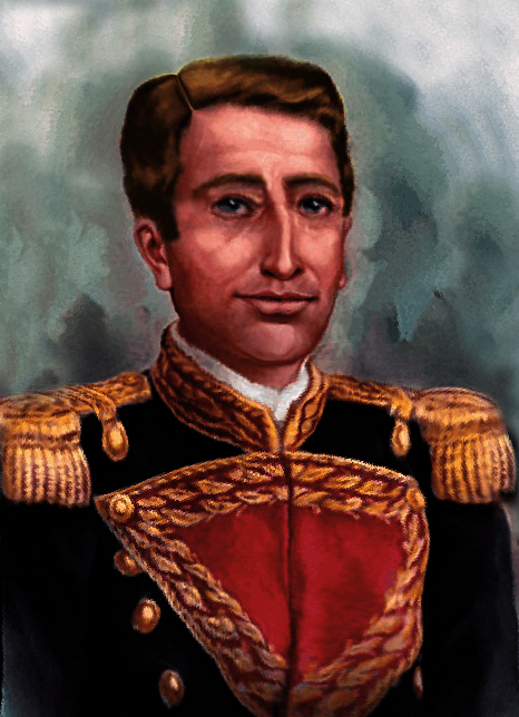 Retrato hablado del Gral. Pedro Meoqui Mañón, muerto por la defensa de la patria el 8 de agosto de 1865 en Hidalgo del Parral, Chihuahua